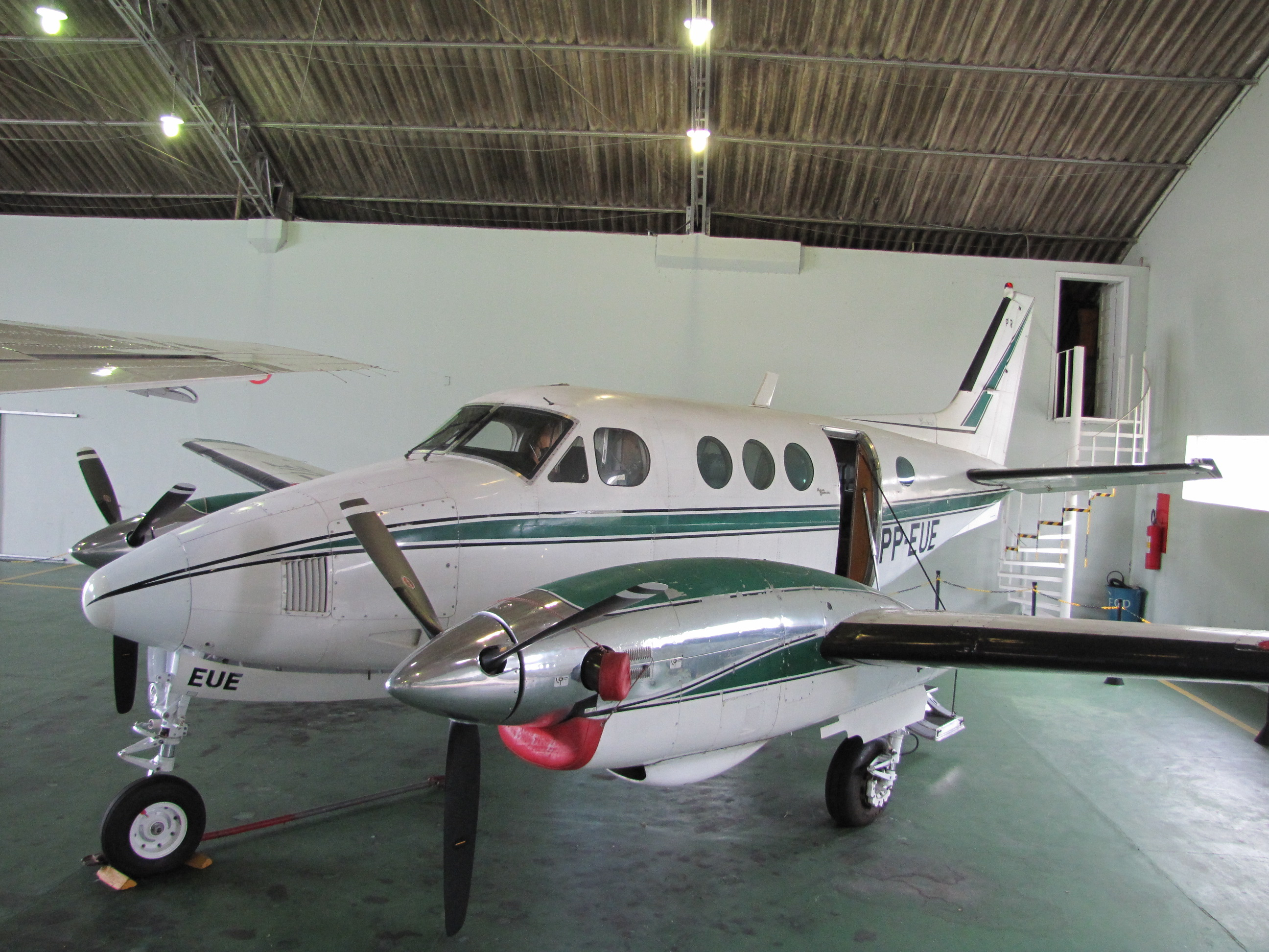 Aeronave da Seção de Transporte Aéreo do Paraná.